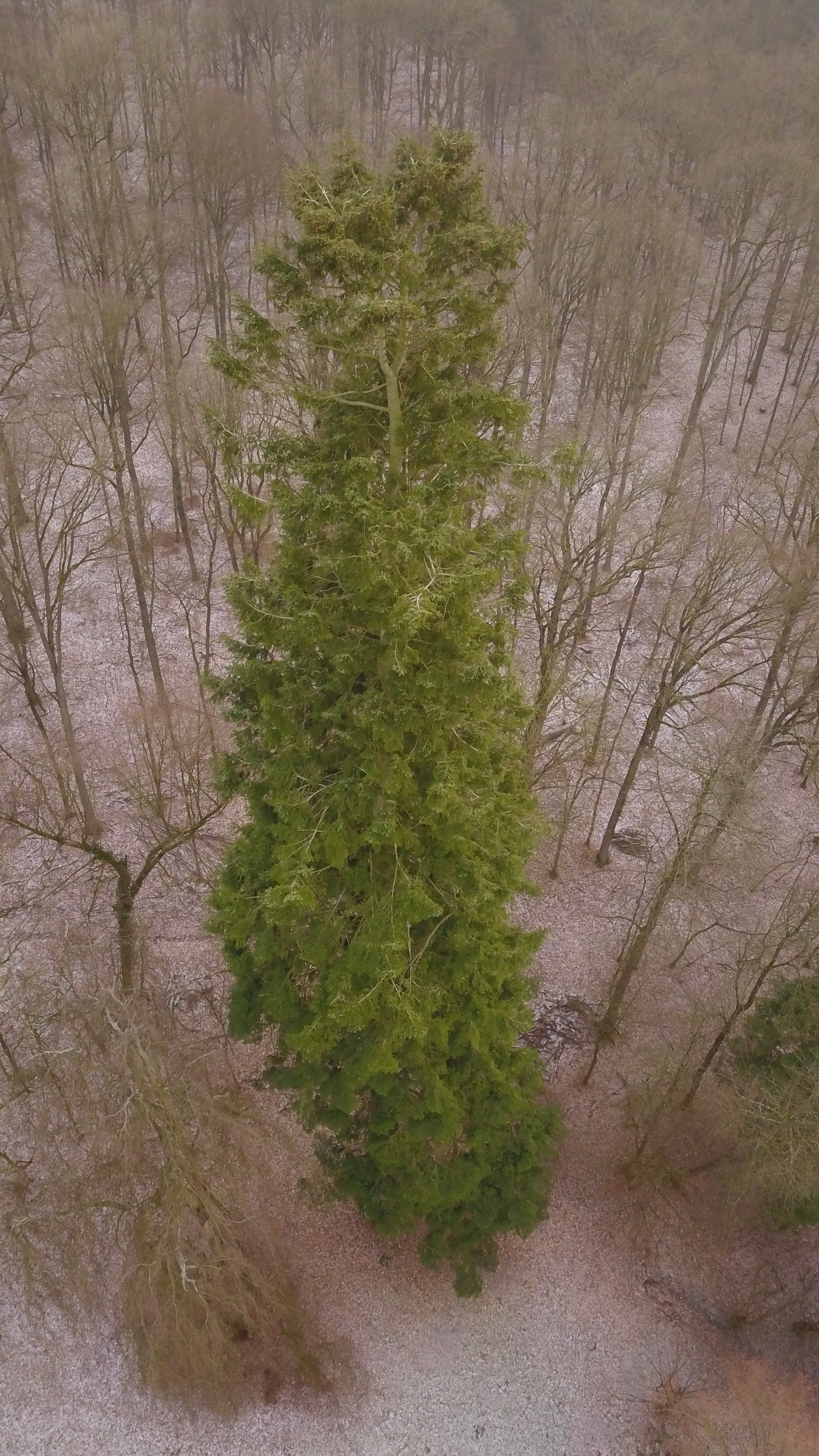 Küsten-Tanne im Schlosspark Fronhausen, Höhe ca.59 Meter